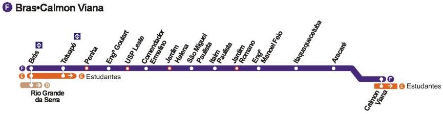 Line F - CPTM